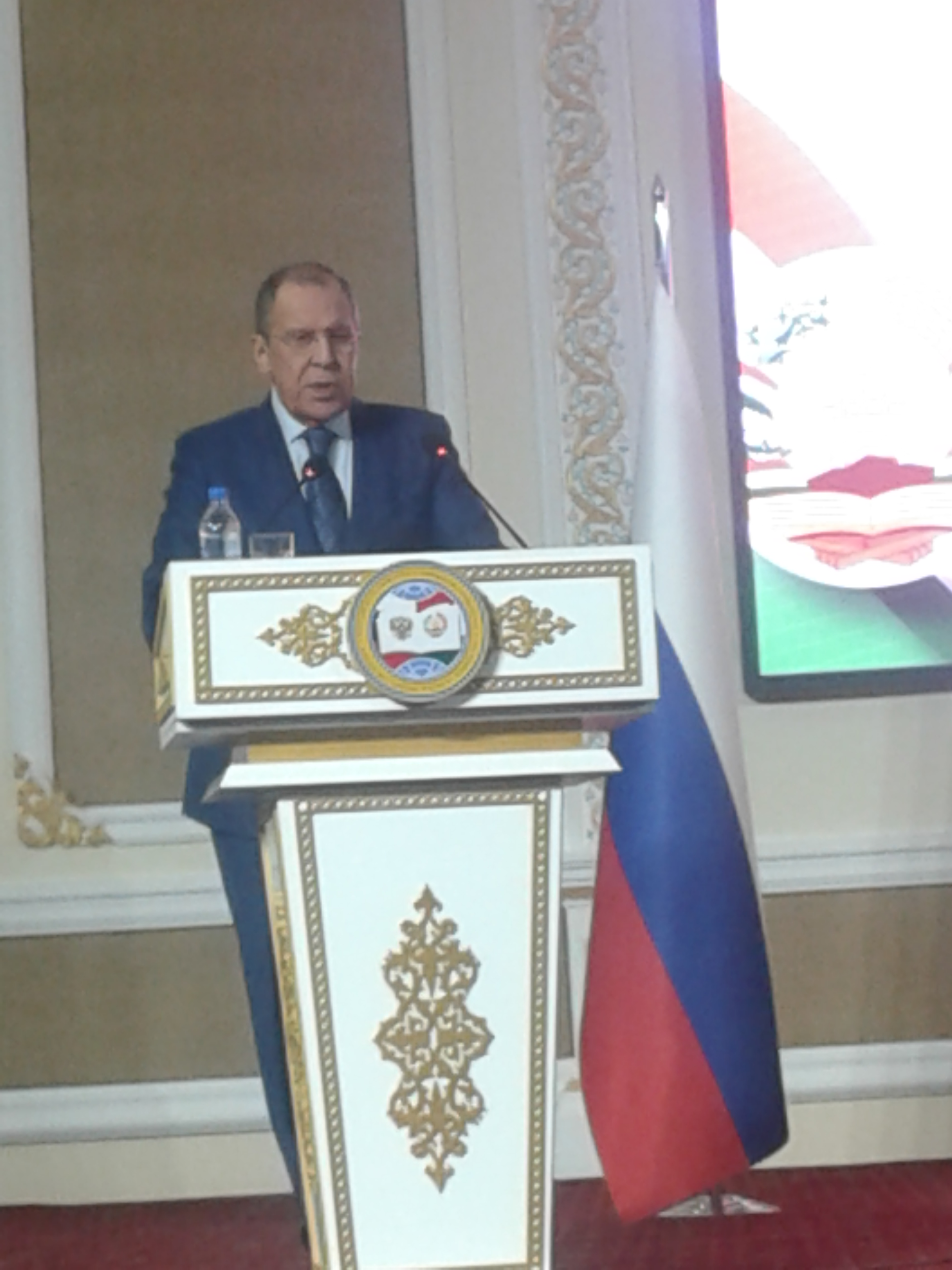 Министр иностранных дел России Сергей Лавров во время встречи с общественностью в РТСУ, г. ДушанбеТоҷикӣ: Вазири корҳои хориҷии Русия Сергей Лавров ҳангоми вохӯри ба ҷомеа дар ДСРТ. ш. Душанбе